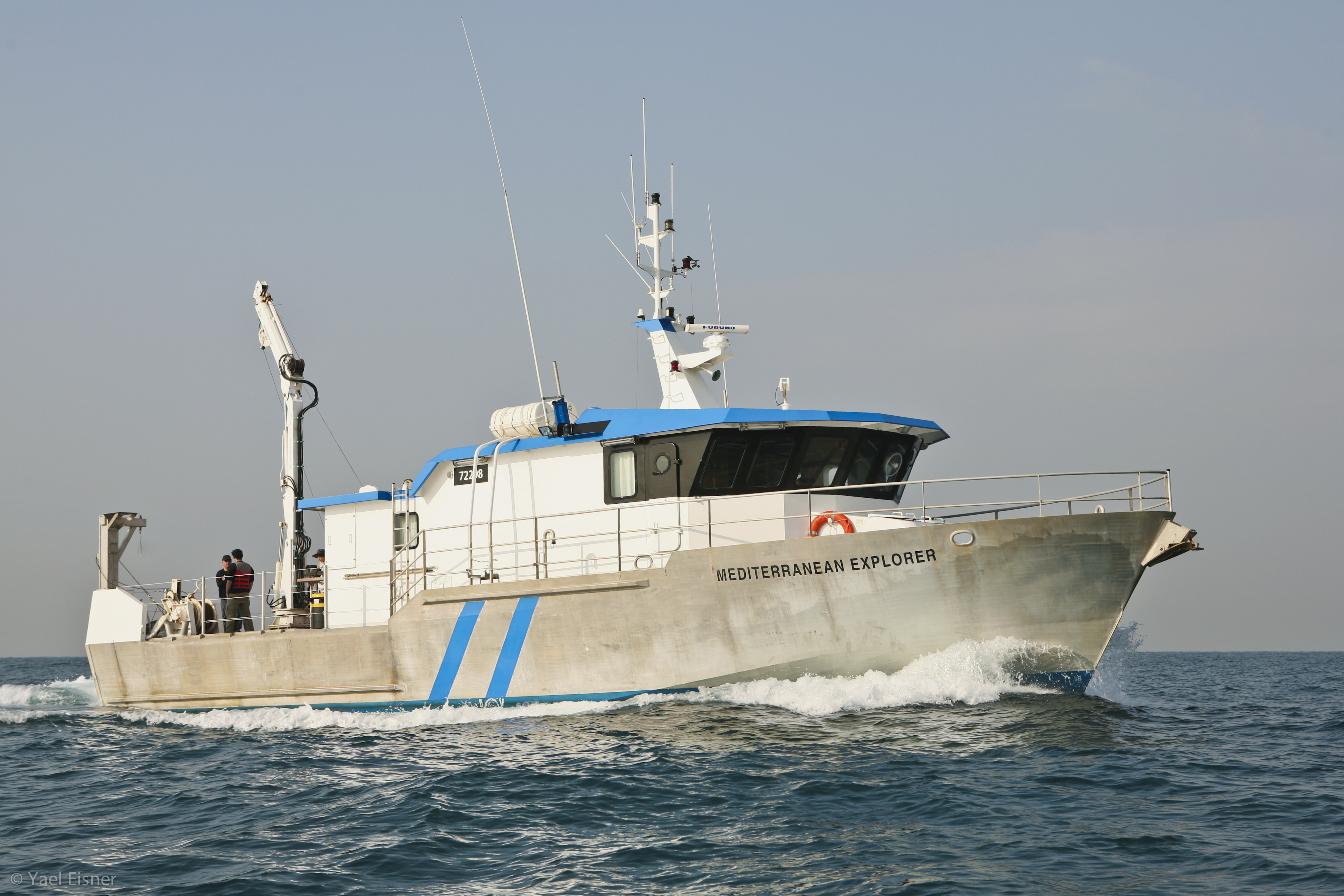 RV Mediterranean Explorer